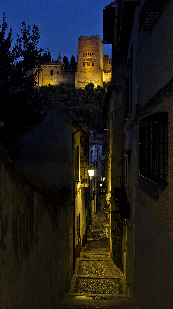 Vista nocturna de la torre de Comares desde el Albaicín